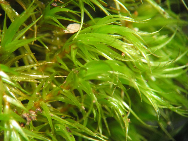 Dicranum scoparium, Rostock